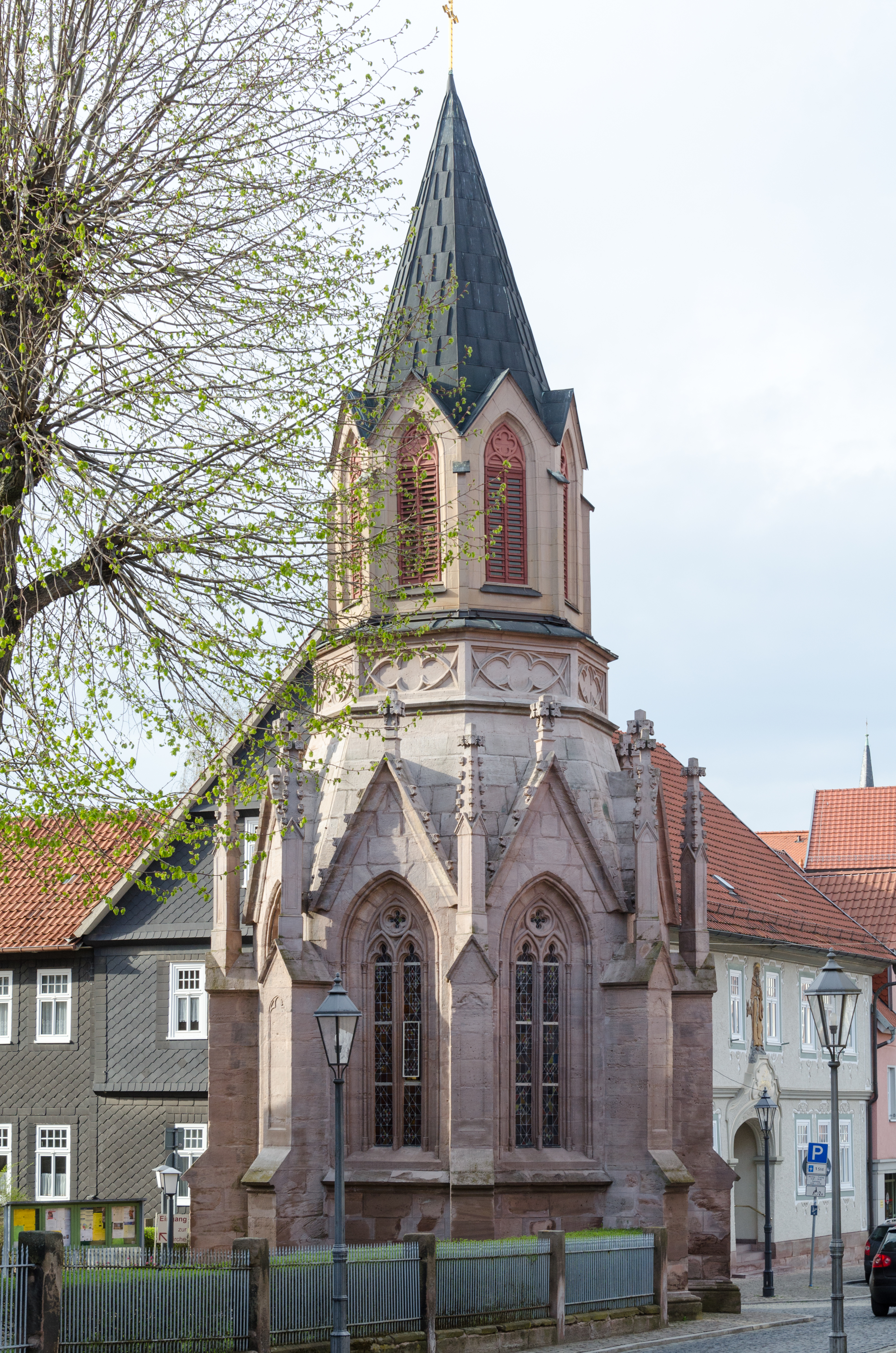 Heilbad Heiligenstadt, Neustädter Kirchgasse 5, Mariahilfkapelle